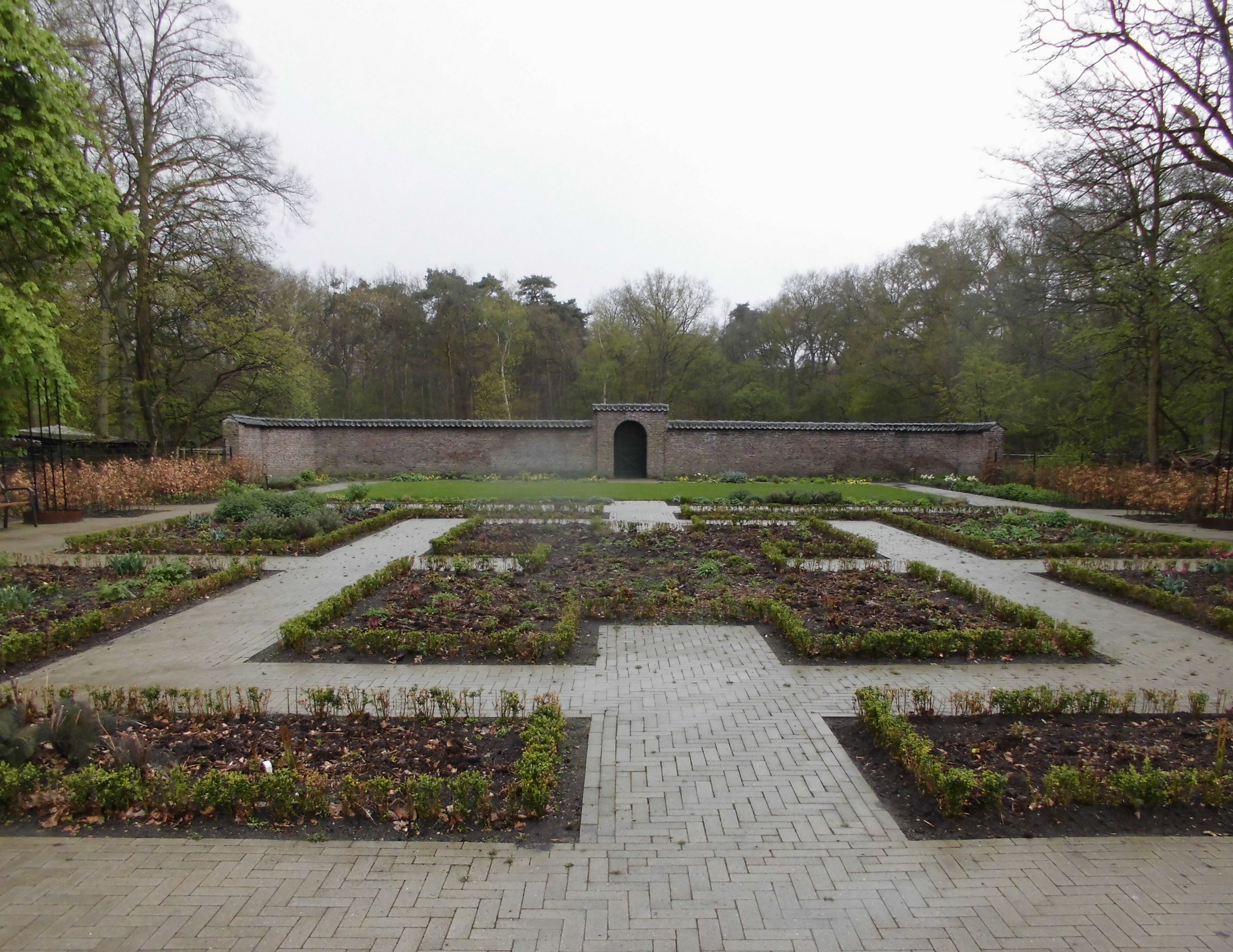 Hydepark Moestuin Zuidelijke rozentuinmuur Doorn